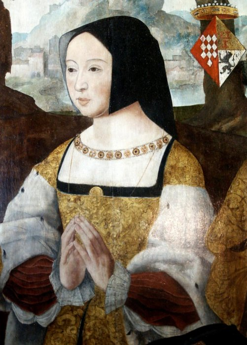 Elisabeth van Culemborg, vrouwe van Hoogstraten (1475-1555)